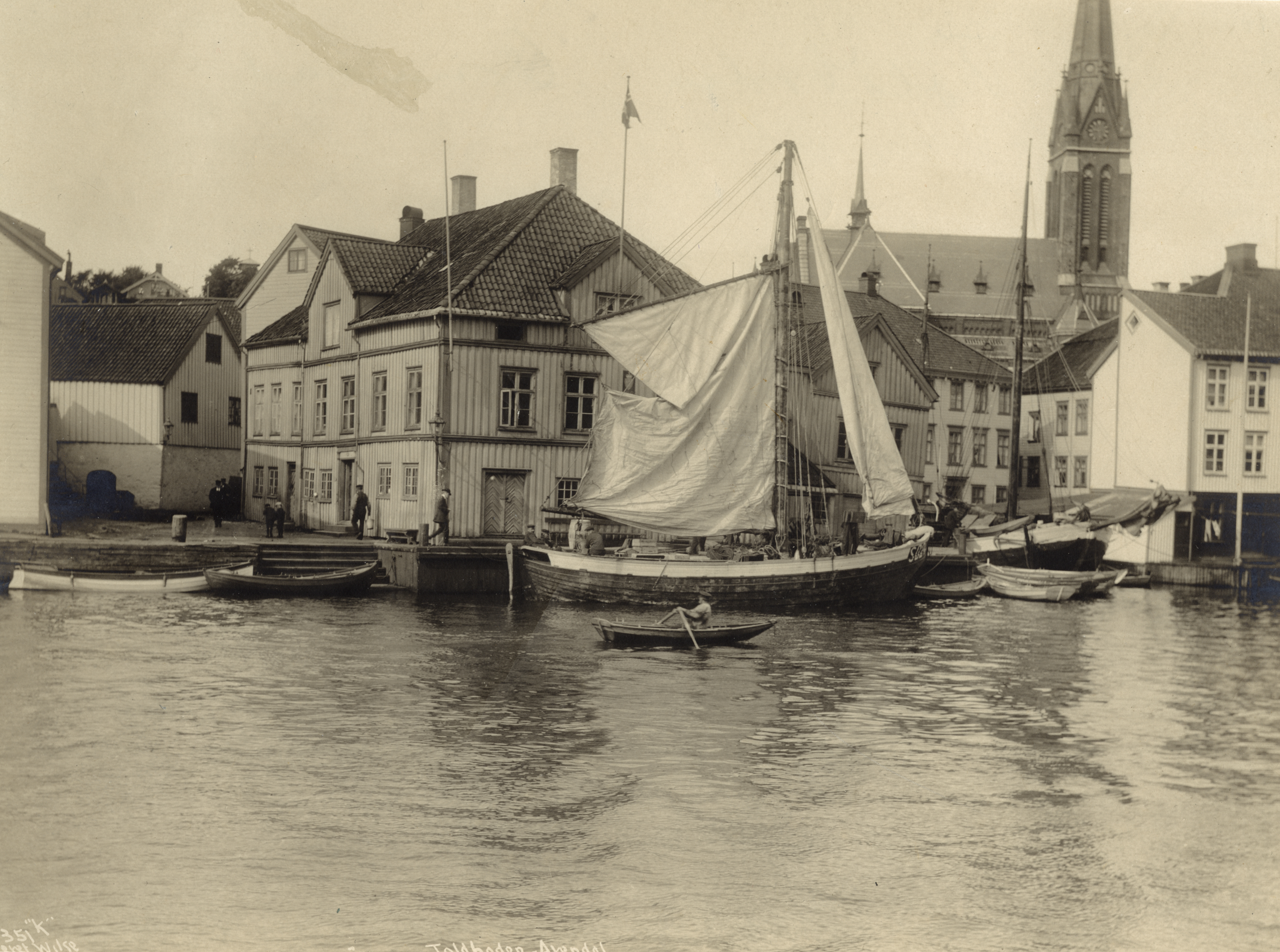 Tollboden, Tyholmen, Aust-Agder This image on crowdsourcing geotagging platform Fotodugnad